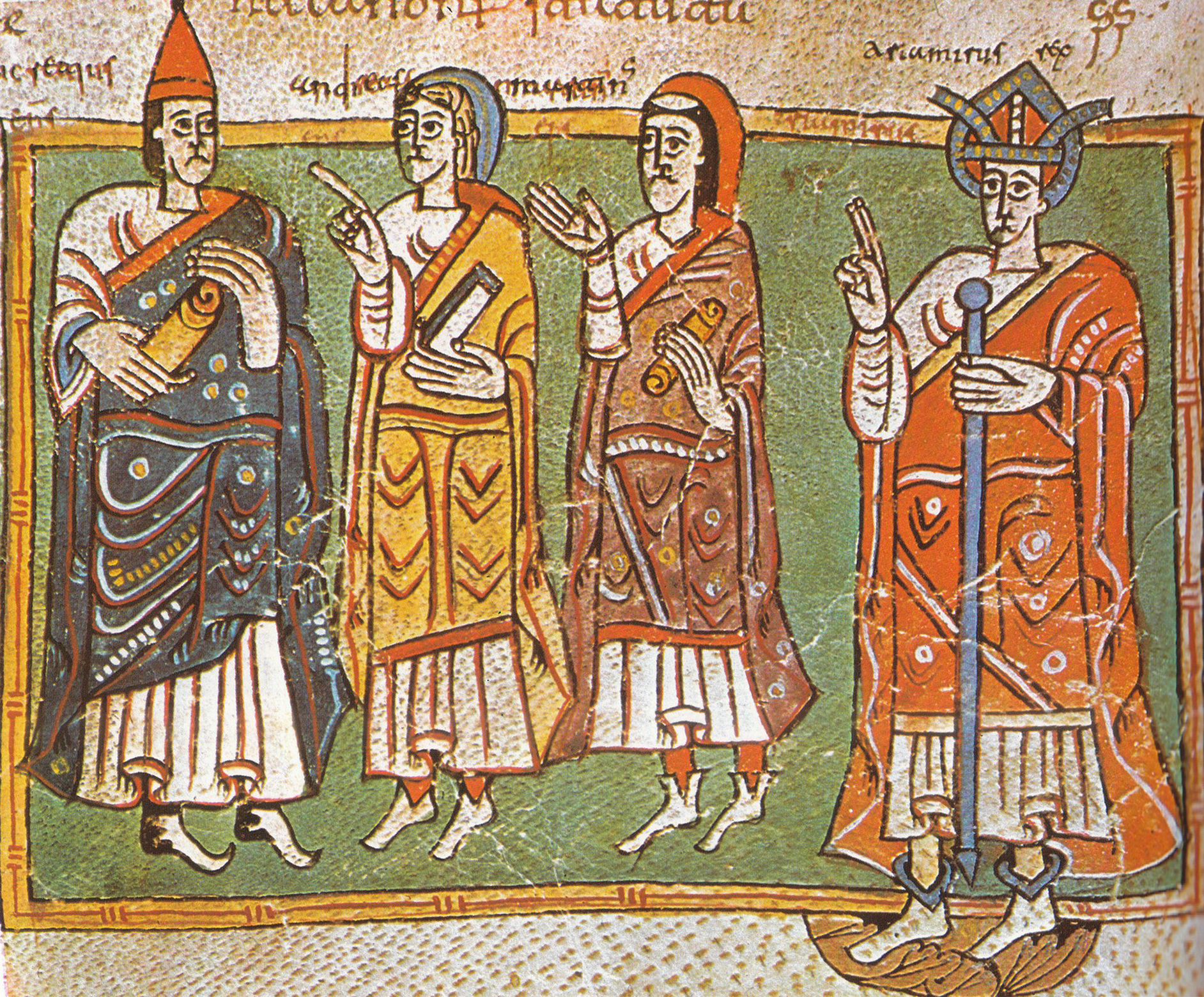 O rei Ariamiro (ou Teodomiro), rei da Gallaecia, xunto aos bispos André, Lucrecio e Martiño.